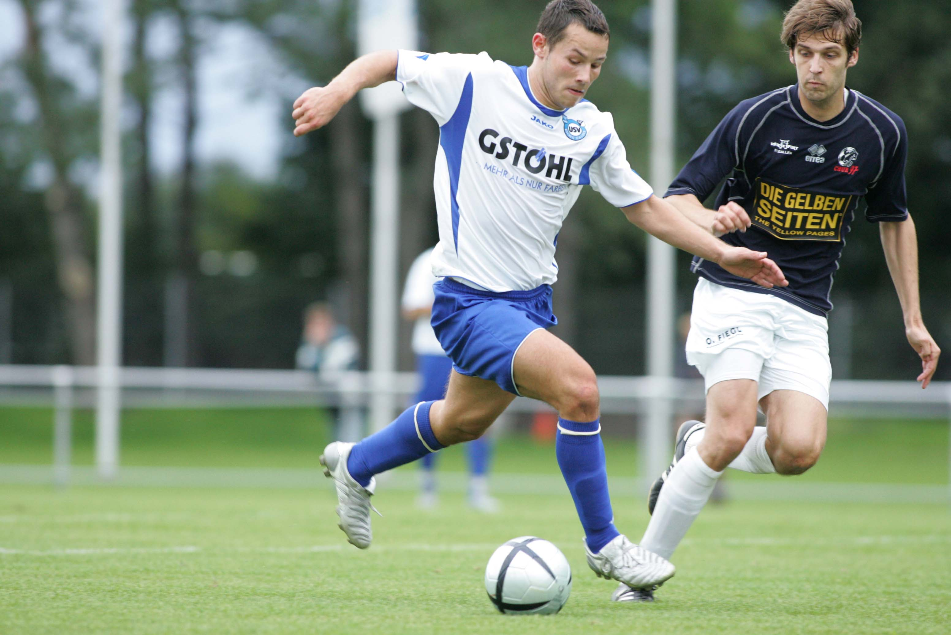 Ronny Büchel (left, 39 caps for Liechtenstein), in the dress of USV Eschen-Mauren